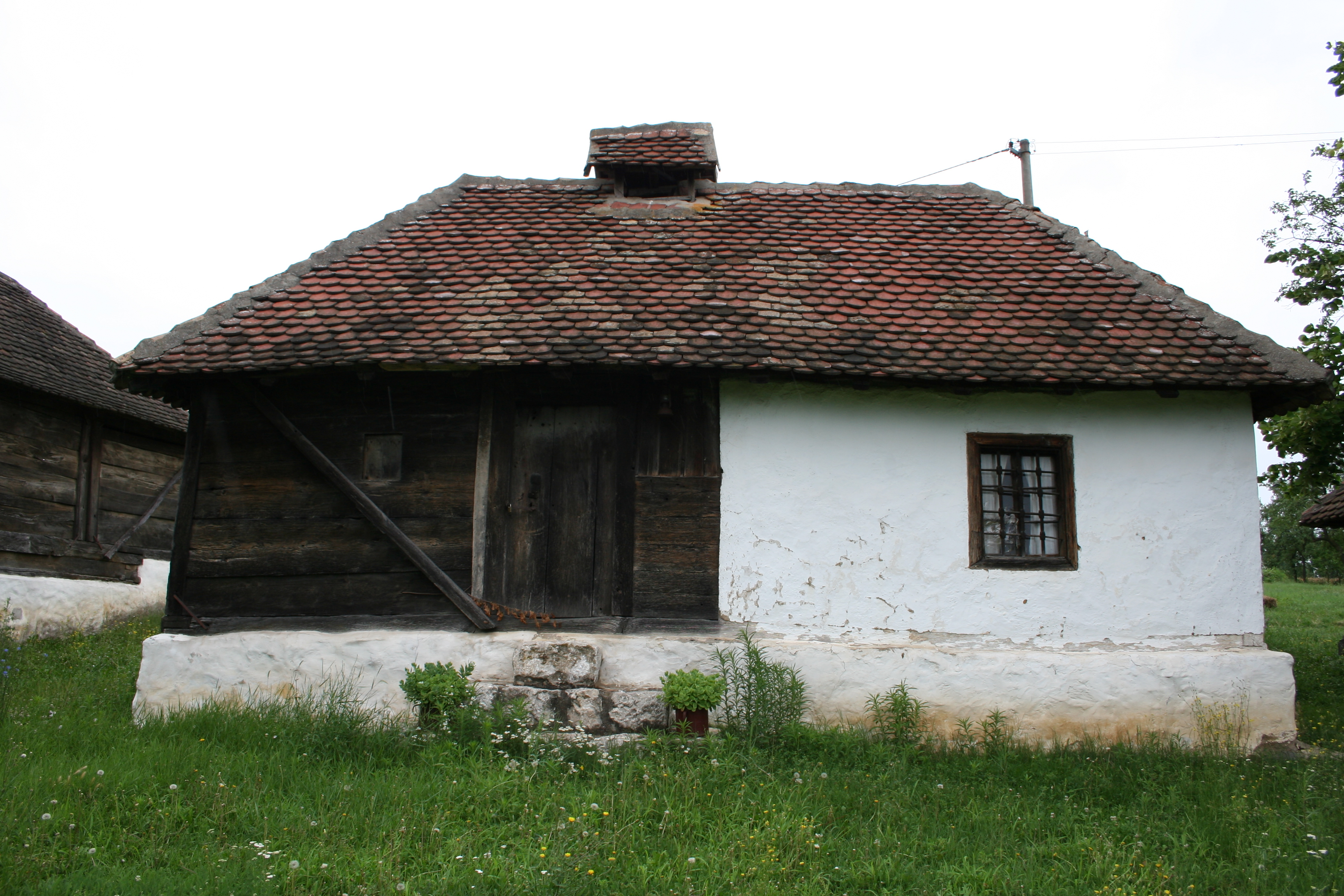 Domaćinstvo Đakovića, Nakučani